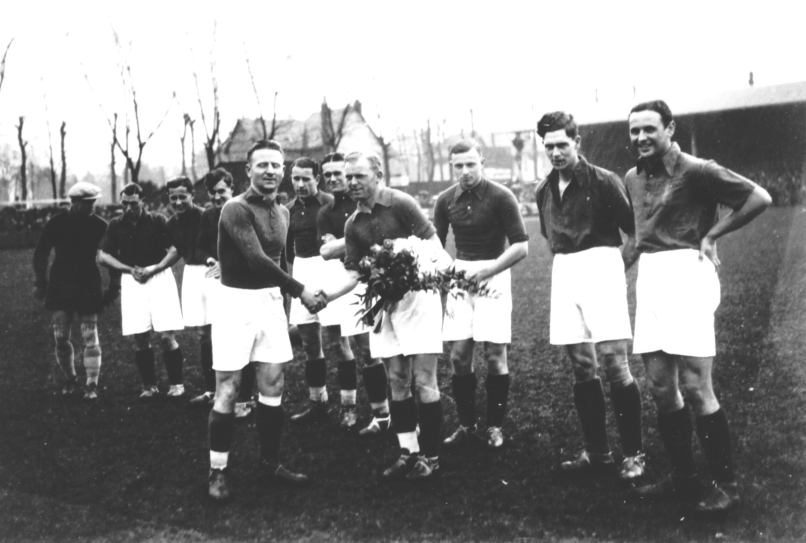 29 MArs 1936 FCR contre LENS (6:1) A l'occasion de la Naturalisation de Mathieu ANDRE